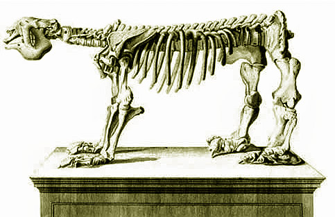 Dessin de cuvier, représentant (sans sa queue) le Paresseux terrestre, ou paresseux géant d'Amérique du Nord (autrefois nommé Megalonyx ou Mégathère de Jefferson), dont le nom scientifique est Megatherium est une espèce éteinte qui a vécu en Amérique du Nord lors du Pléistocène. Noter l'éperon osseux au niveau du coude avant. Selon les squelettes découverts aux USA, certains individus dépassaient 2 m de hauteur.